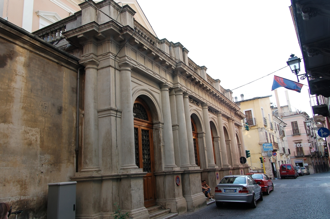 Sulmona 2011